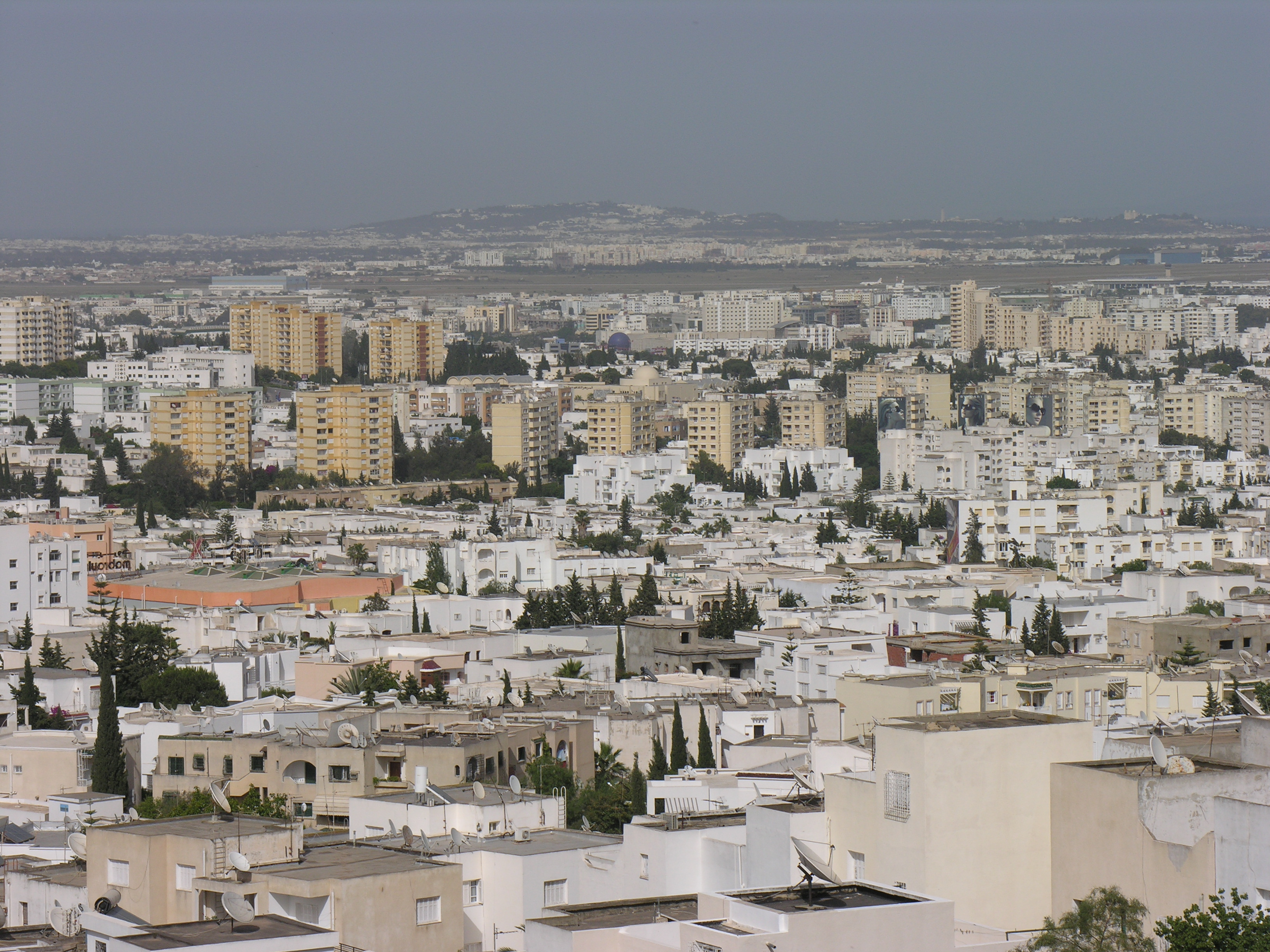 La Banlieue nord de Tunis. Au premier plan les quartiers d'El Menzah et d'El Manar. Plus en avant, dans la zone verte, on voit l'aéroport Tunis-Carthage. Ensuite on voit La Soukra et les quartiers d'El Aouina. Au fond on aperçoit la colline de la Marsa-Sidi Bou Said.